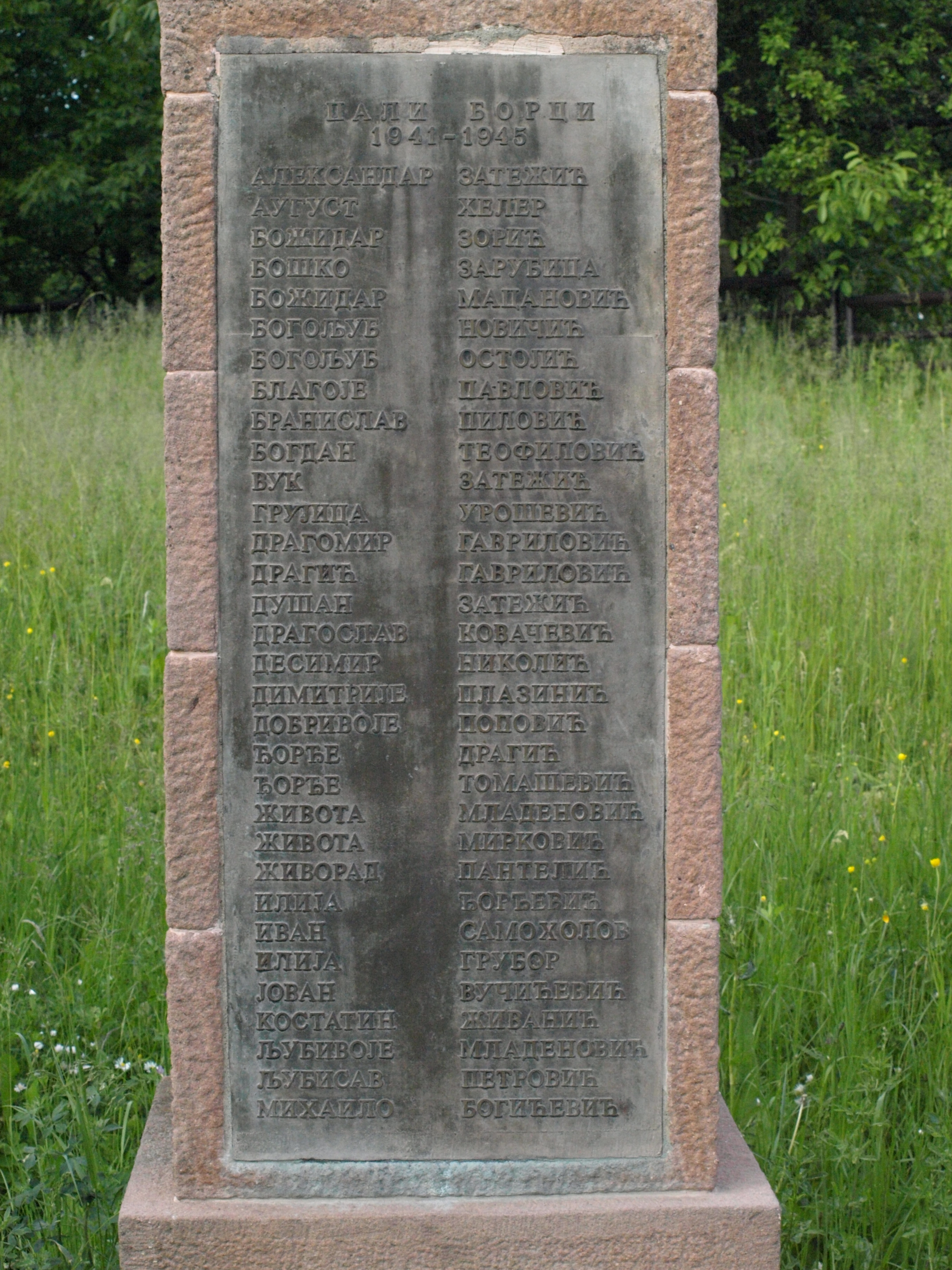 Srpskohrvatski / српскохрватски: Spomenik palim borcima Ljubićke čete na brdu Ljubiću iznad Čačka.